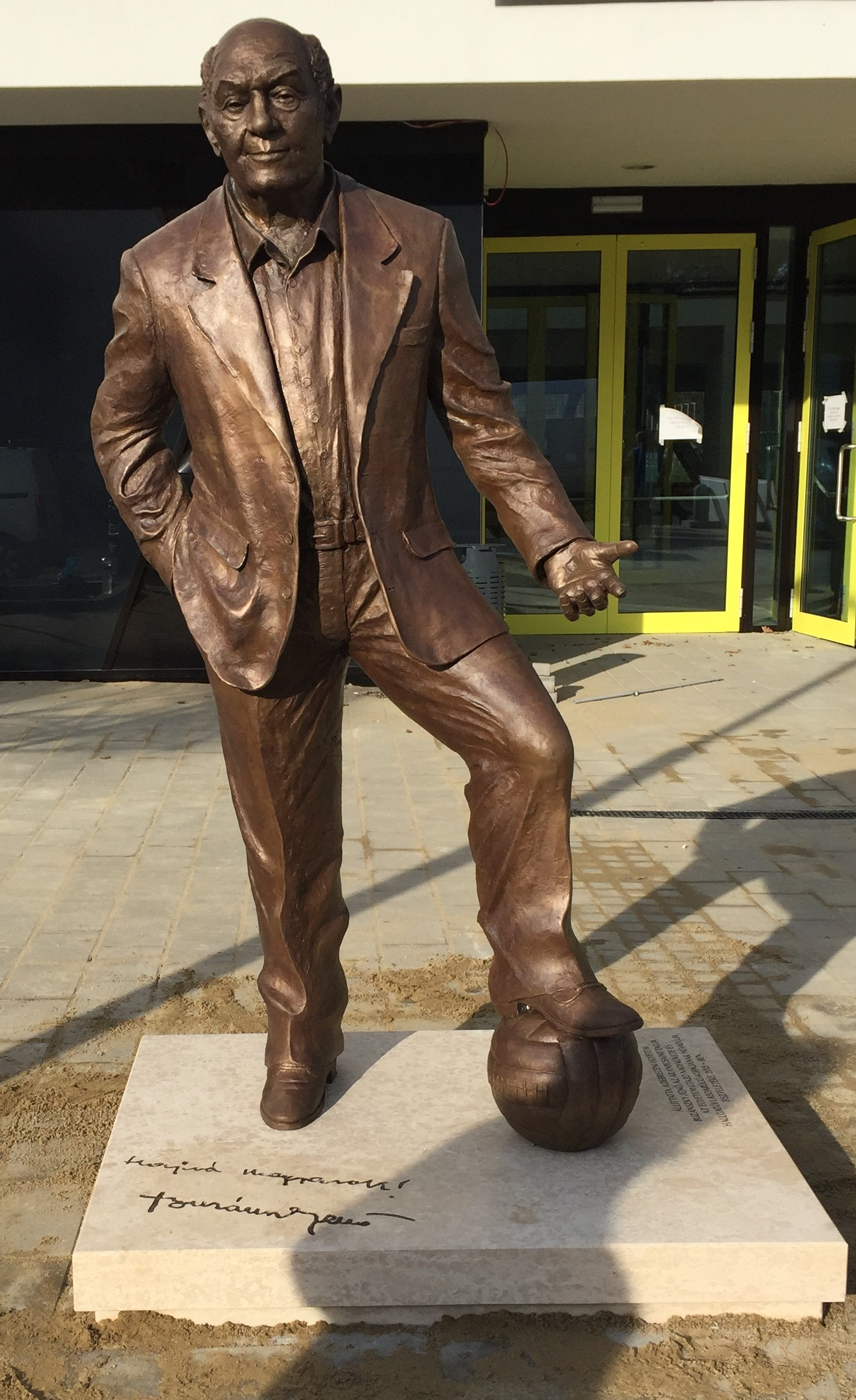 Juha Richárd: Buzánszky Jenő (bronzszobor), Debrecen